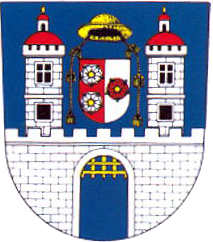 Stvolínky znak